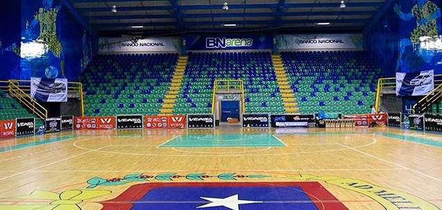 gimnasio multiuso, parte del complejo deportivo de Hatillo.